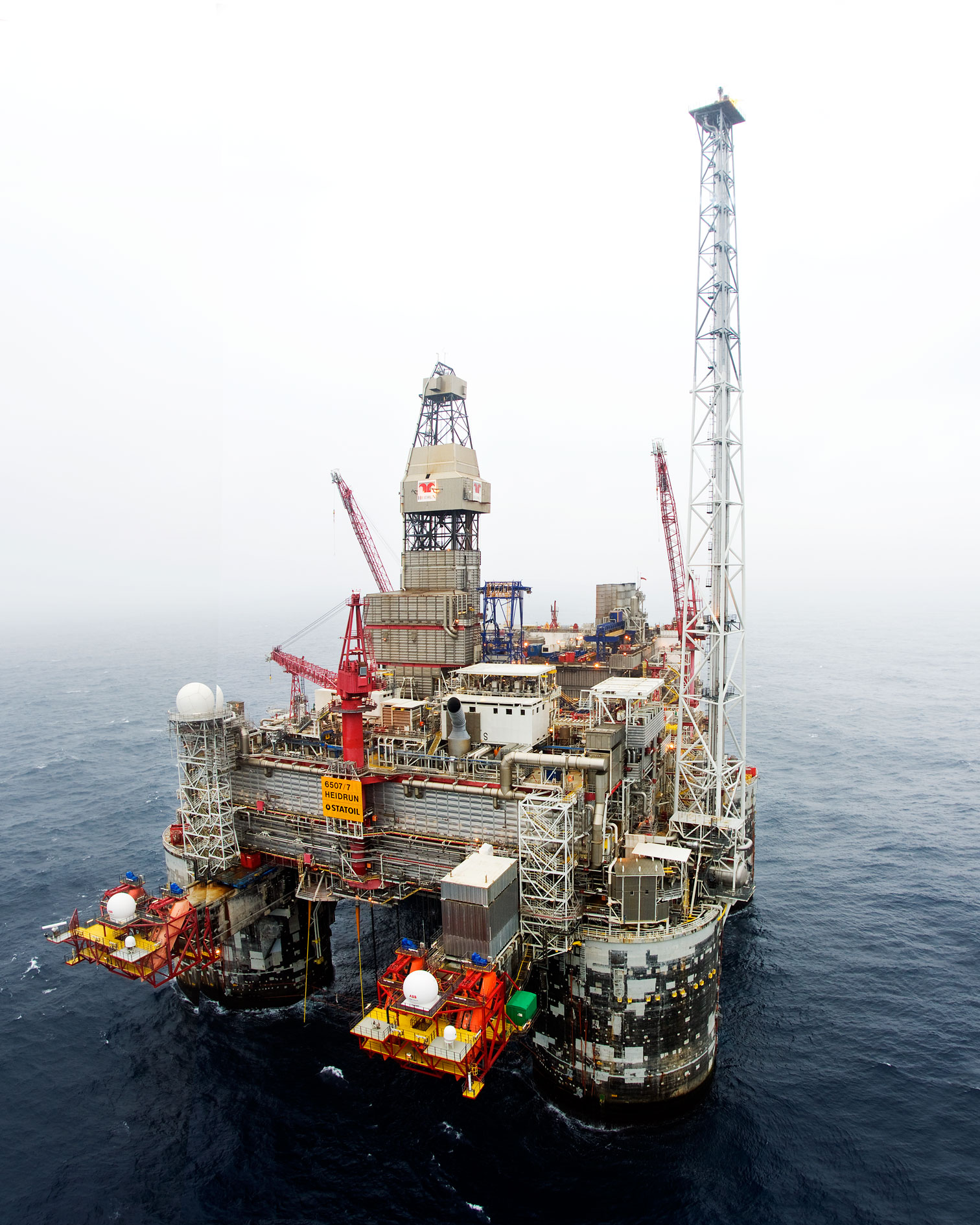 Heidrun